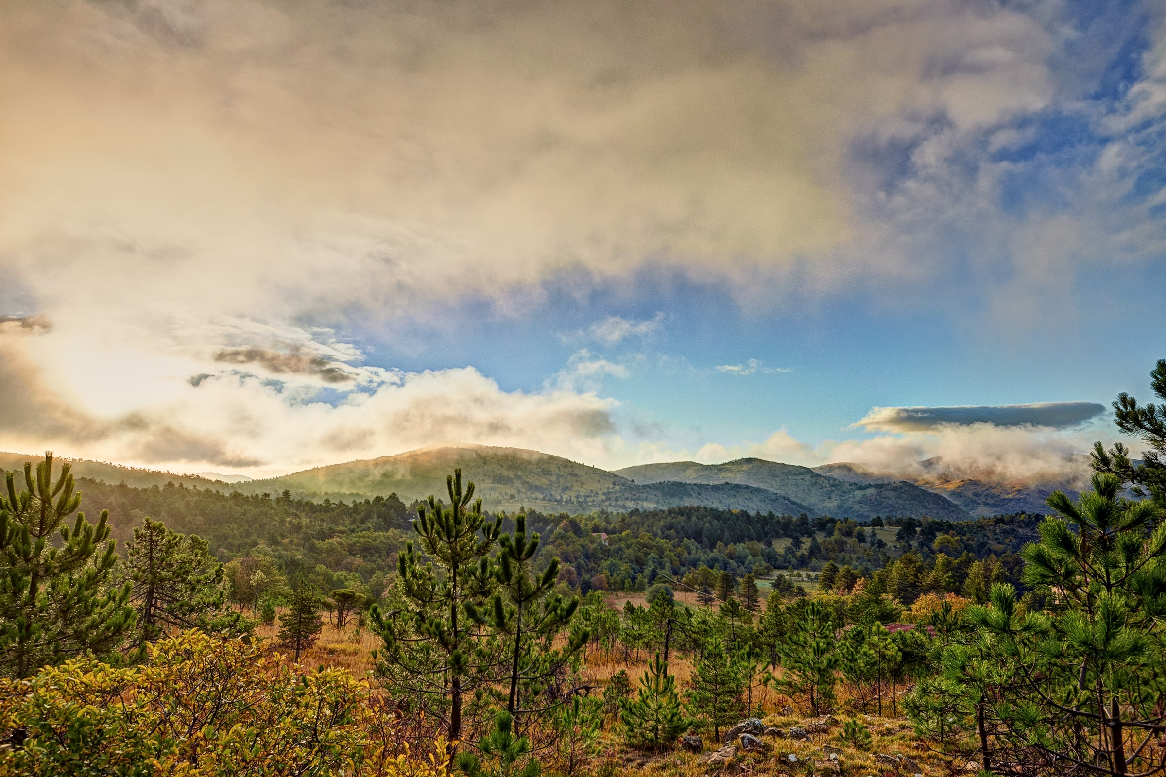 Nei pressi del monte Orditano